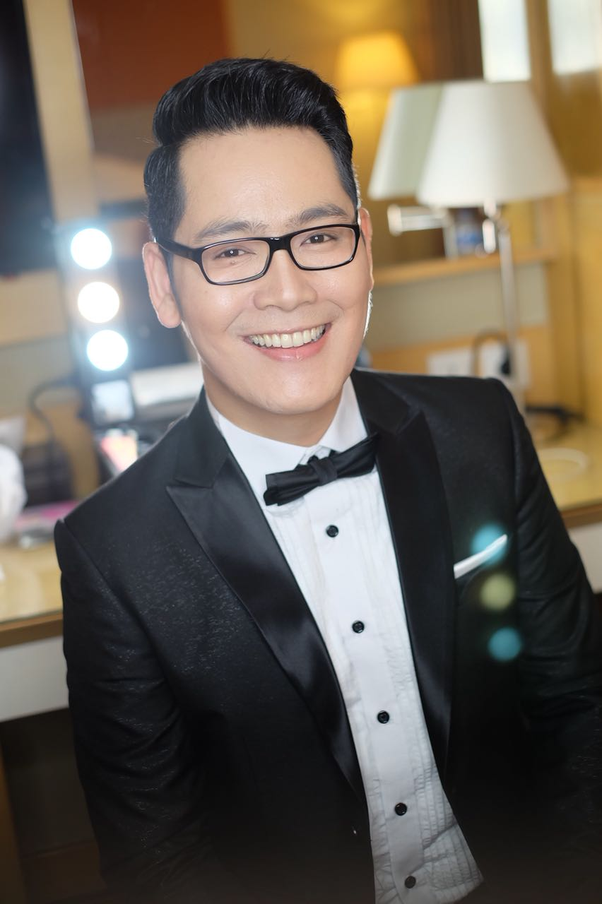 Foto Tommy Siahaan dalam kegiatannya ketika membawakan sebuah acara